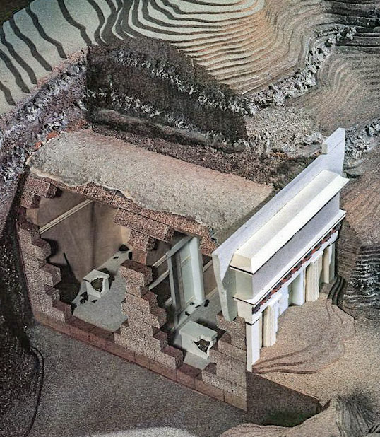 makieta grobowca Filipa II Macedońskiego